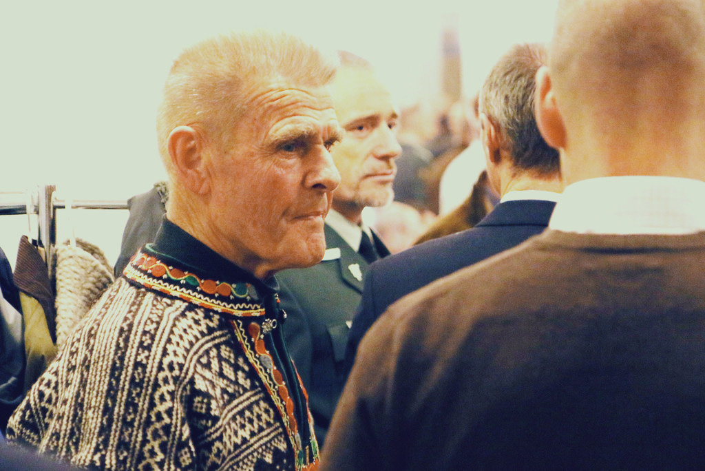 Hvem: Ljå Forlag / Nils Faarlund Hva: Lanseringsfest for boken Friluftsliv - en dannelsesreise Hvor: Studio B20, Brettevillesgate 20, Sandaker Hvordan: Ta trikken til Grefsenveien, eller t-bane til Storo Når: 29 Oktober, kl 18:00 Hvorfor: Boklansering, kulturelle innslag, enkel (men veldig god) servering.